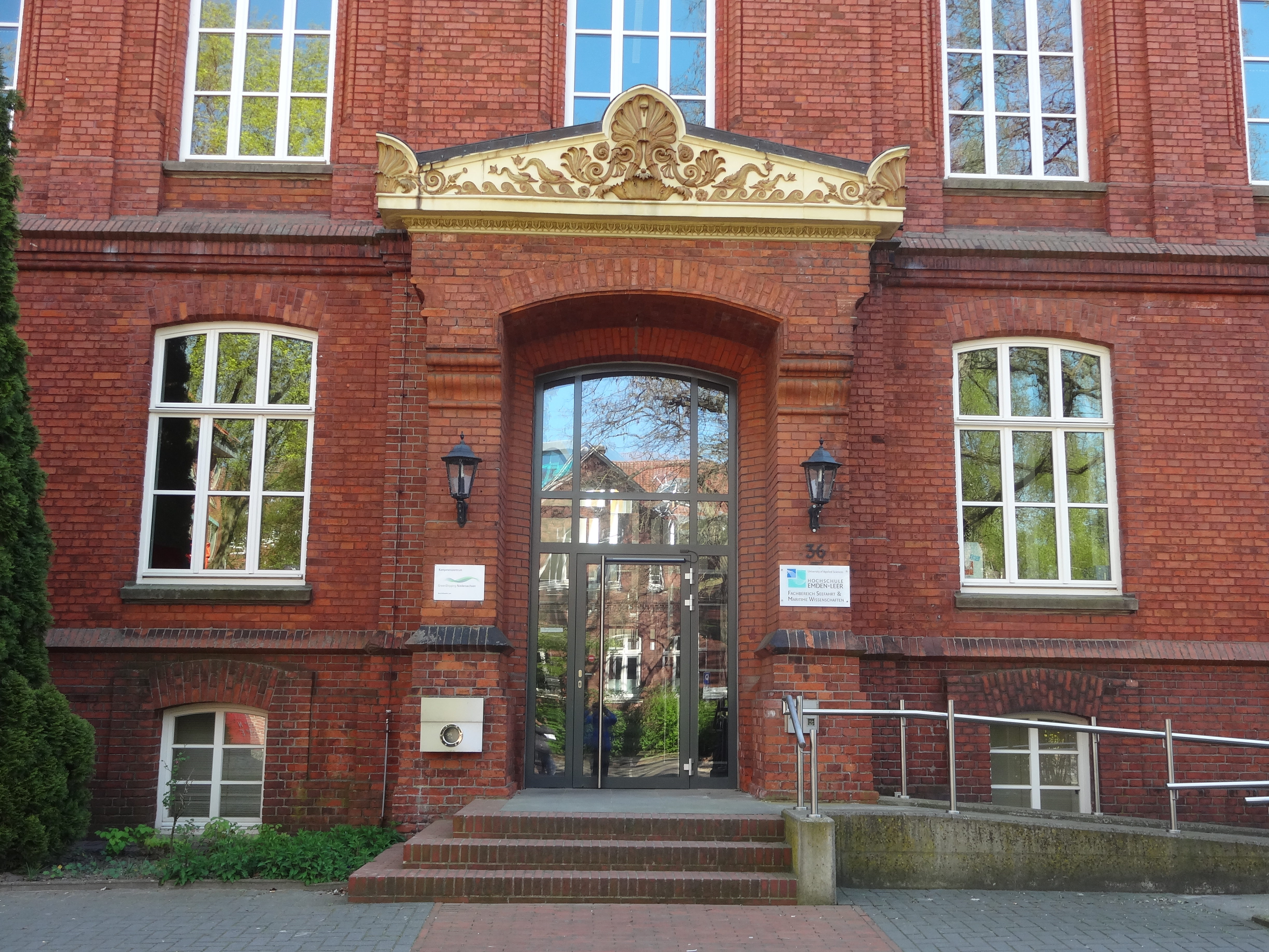 denkmalgeschützte Seefahrtschule in der Bergmannstraße 35 in Leer (Ostfriesland)